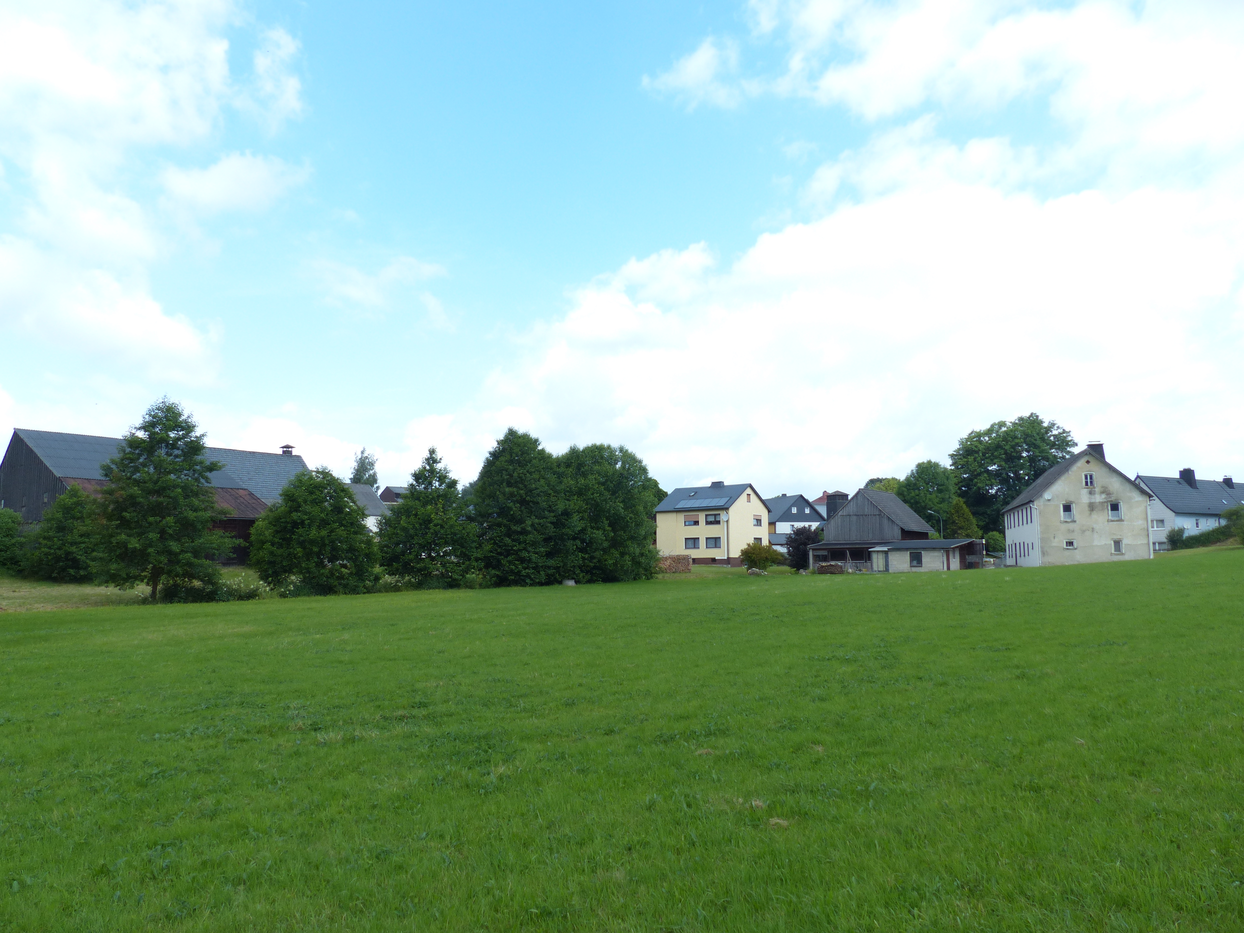 Baudenkmäler/Bauwerke in Oelschnitz